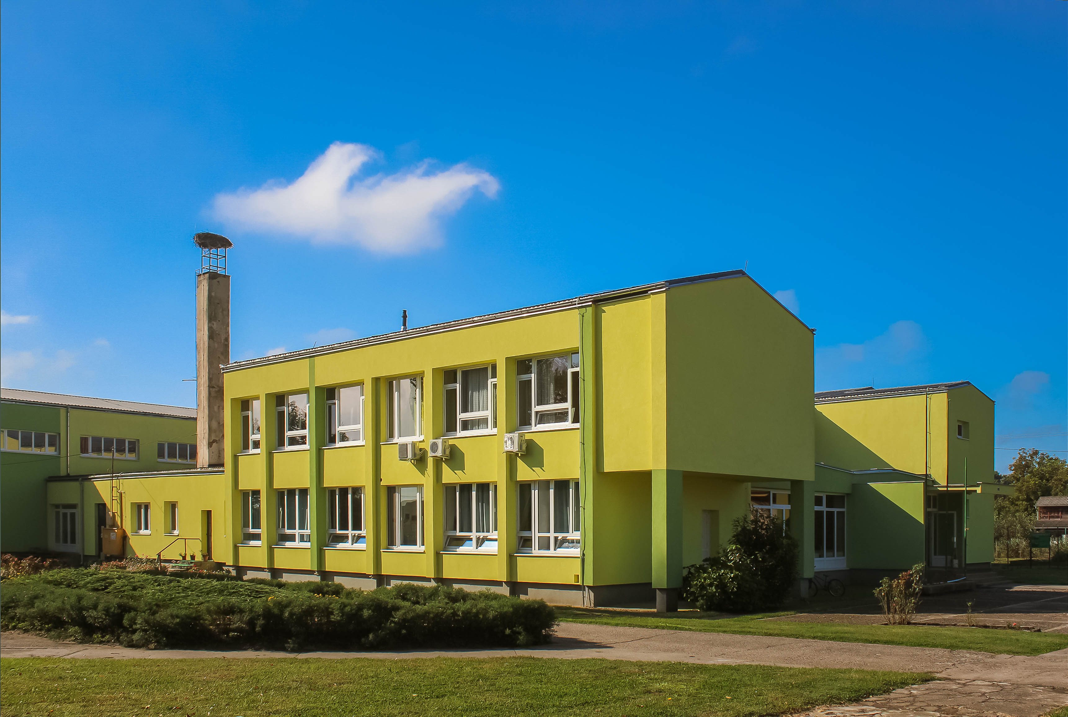 Osnovna škola u Ernestinovu